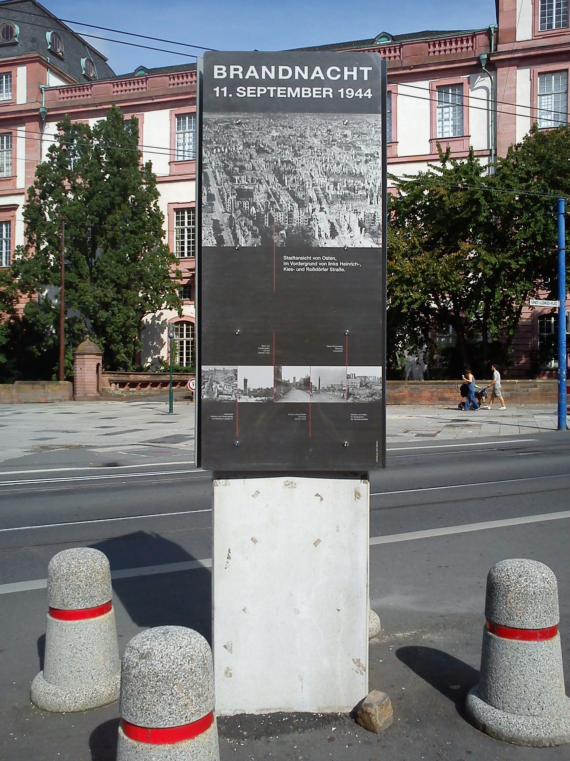 Mahnmal Brandnacht in Darmstadt vor dem Schloss